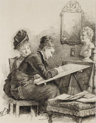 Deux femmes assises dessinant